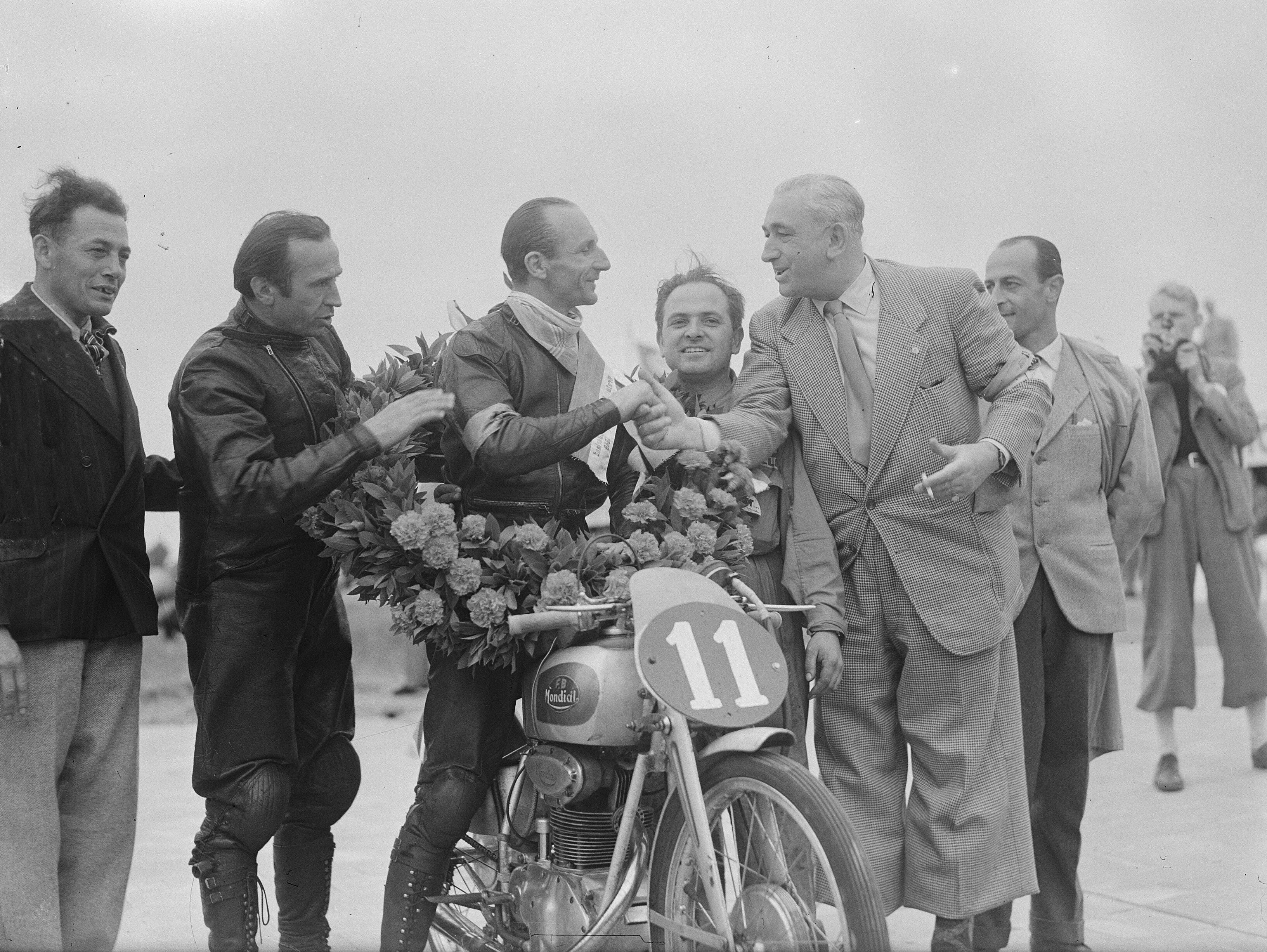 Collectie / Archief : Fotocollectie Anefo Reportage / Serie : [ onbekend ] Beschrijving : Nello Pagani wordt gefeliciteerd door G. J. Bruinsman, voorzitter KNMV Datum : 9 juli 1949 Locatie : Assen Trefwoorden : motorsport Persoonsnaam : Bruinsman, G.J., Pagani, Nello Instellingsnaam : TT Fotograaf : Winterbergen, […] / Anefo Auteursrechthebbende : Nationaal Archief Materiaalsoort : Glasnegatief Nummer archiefinventaris : bekijk toegang 2.24.01.09 Bestanddeelnummer : 903-4797